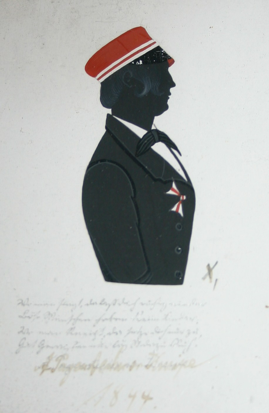 Schattenriss des Zoologen Heinrich Alexander Pagenstecher in Couleur des von ihm gestifteten Corps Hanseatia Göttingen, das durch Fusion im Corps Hannovera Göttingen aufging.